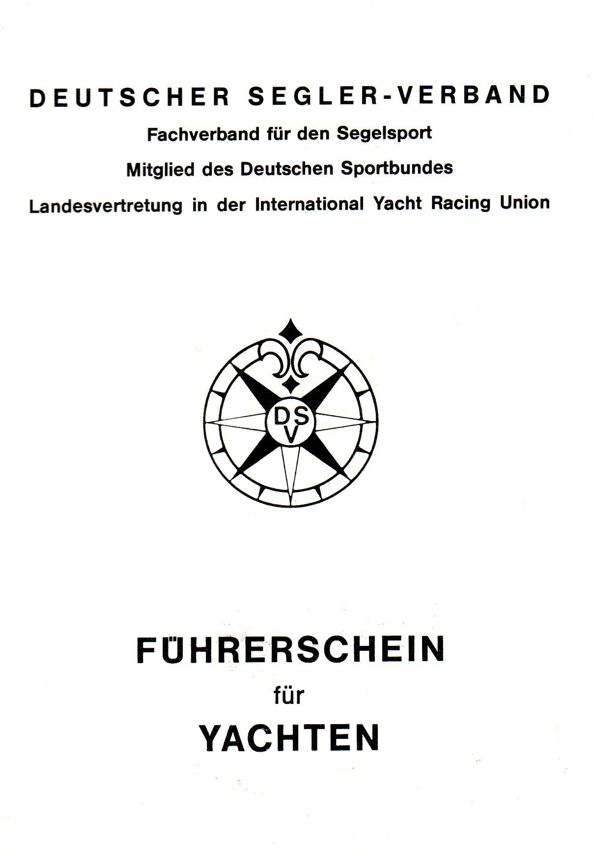 BR-Schein des Deutschen Segler Verbandes